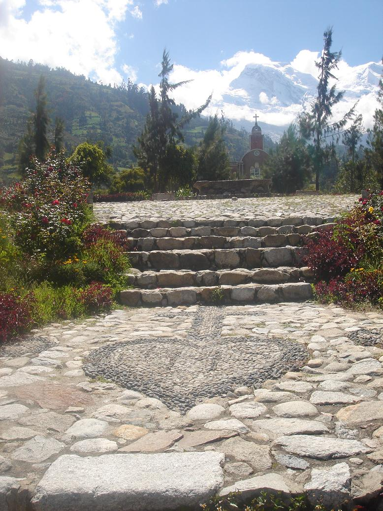 Cumbres del nevado Huascarán vistas desde los restos de la Catedral de Yungay - Ancash (PERU).